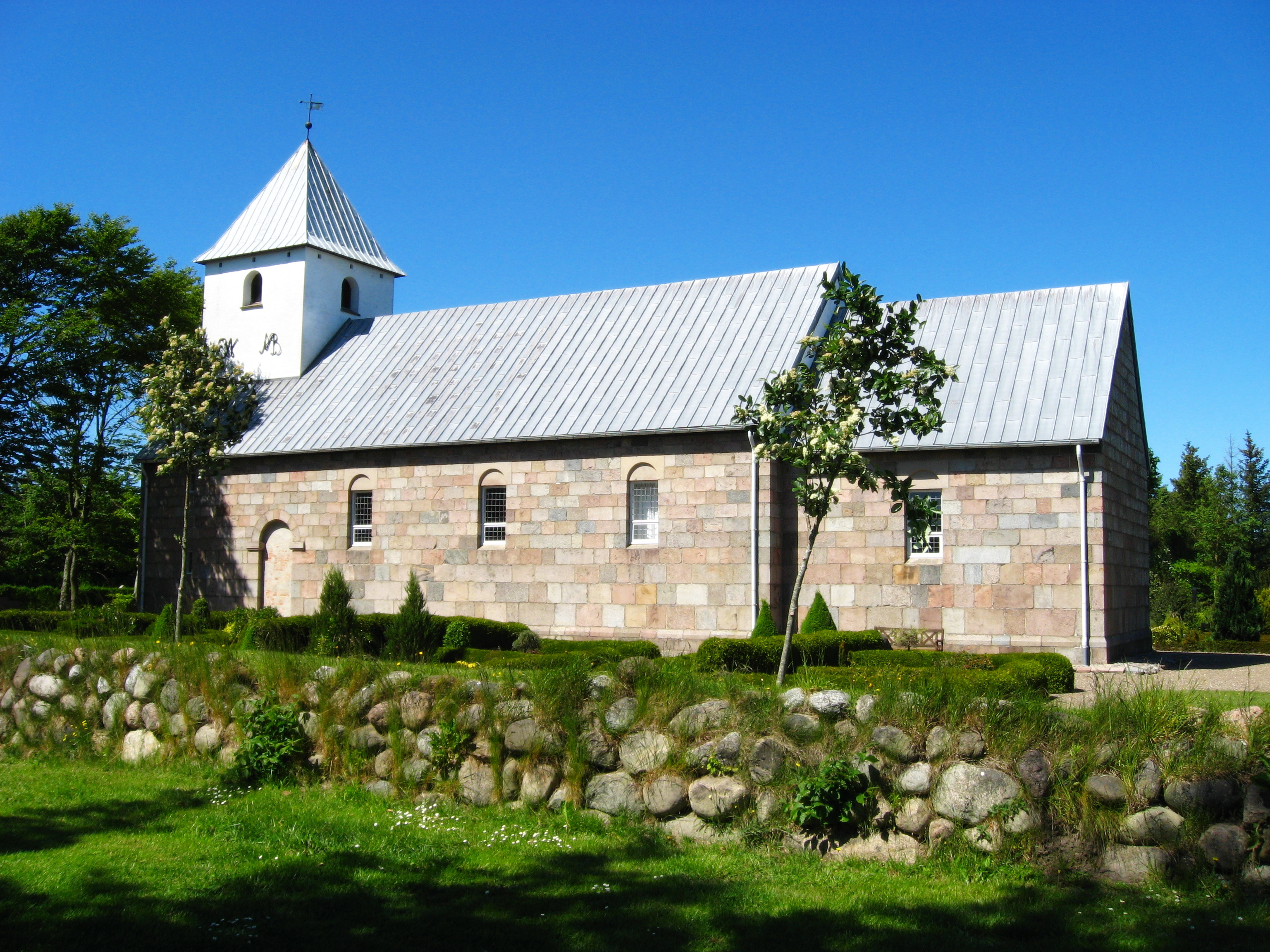 Rubjerg Kirke